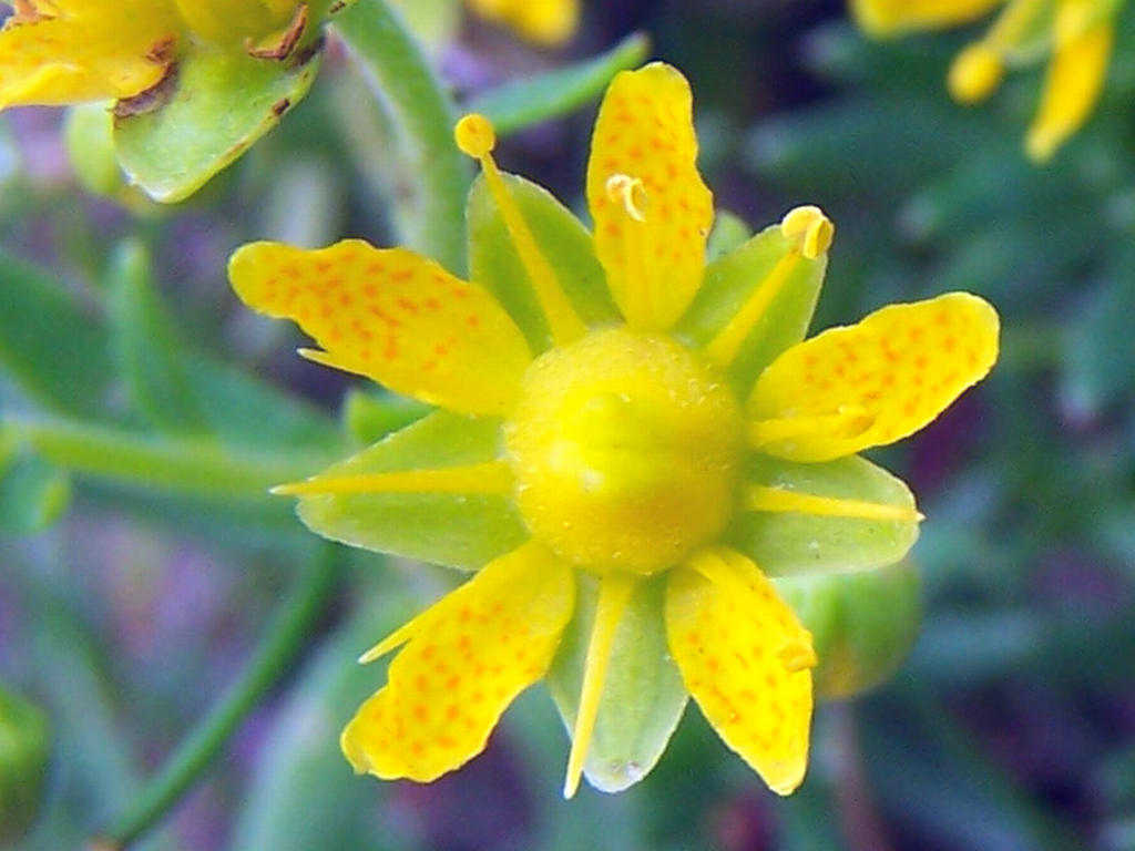 Saxifraga aizoides (pl. skalnica nakrapiana), habitat: Tatra Mountains, Dolina Gąsienicowa